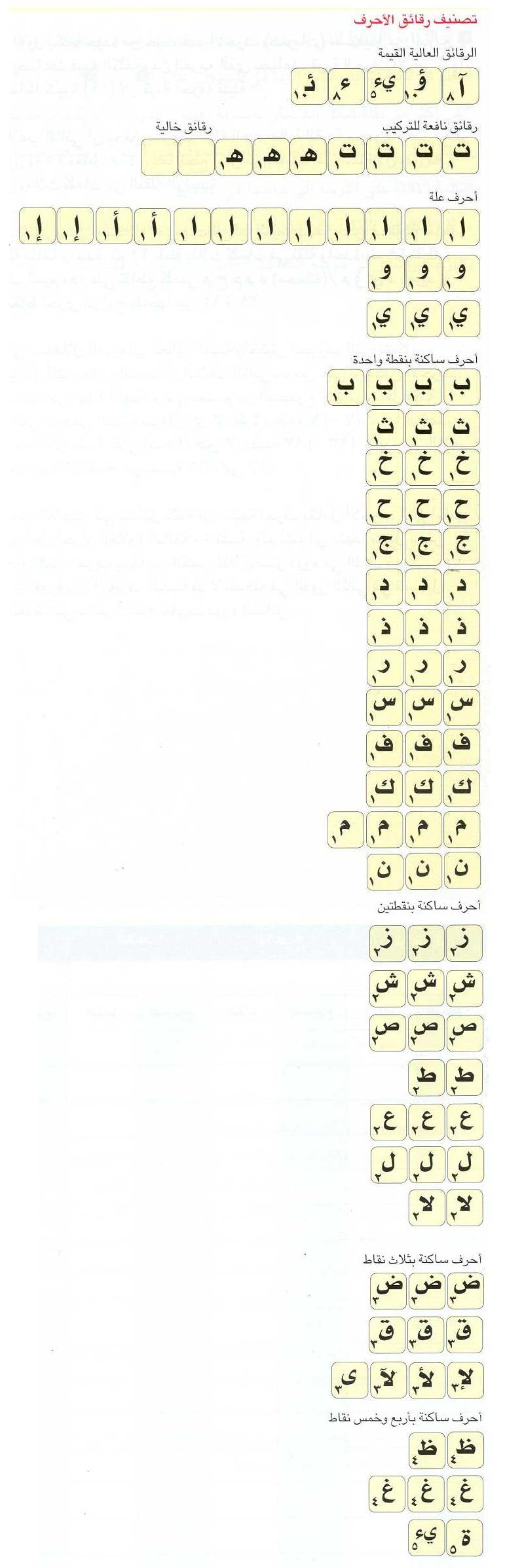 Het Arabische Scrabblespel In tekst: Philip Nelkon Mattel Games Mattel House Vanwall Business Park Vanwall Road Maidenhead